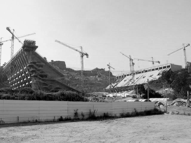 Estádio Municipal de Braga durante a sua construção.